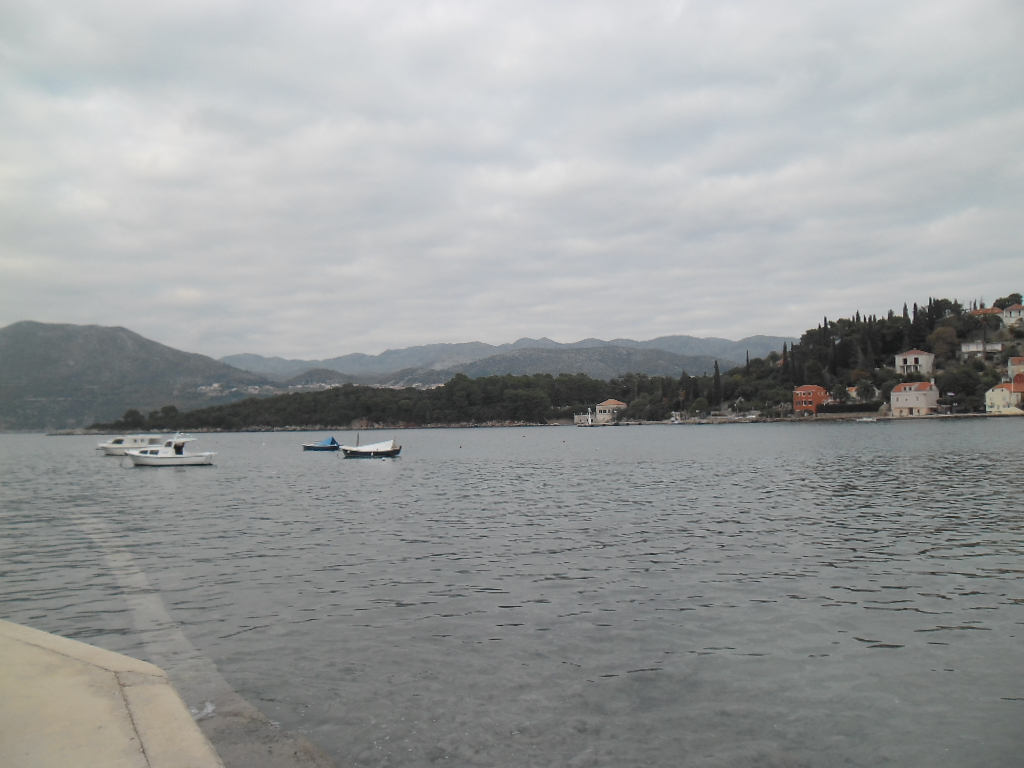 Koločep